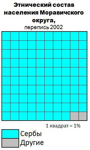 Этнический состав населения Моравичского округа (Сербия)